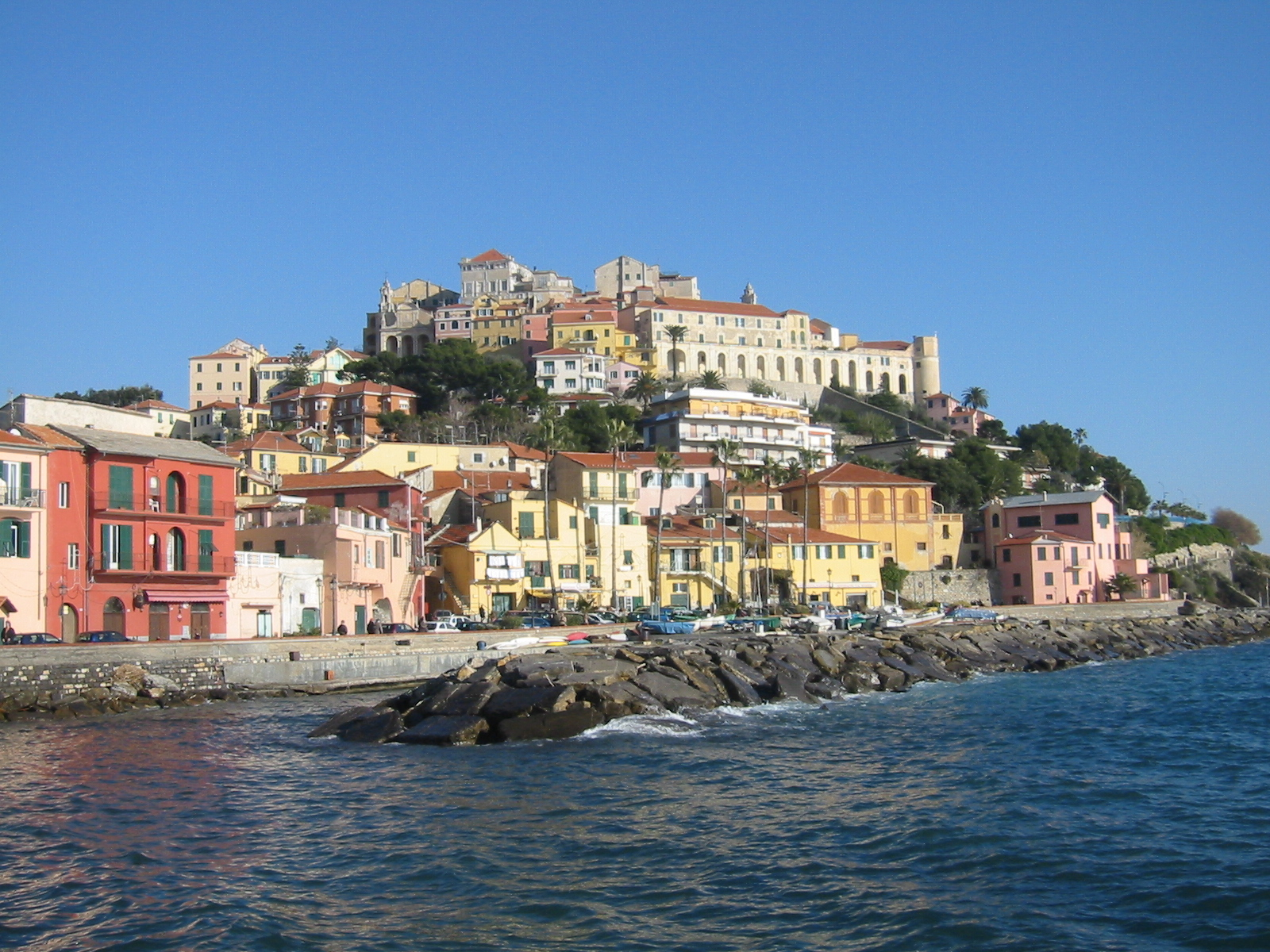 Porto Maurizio da Borgo Foce (Imperia, Italy)